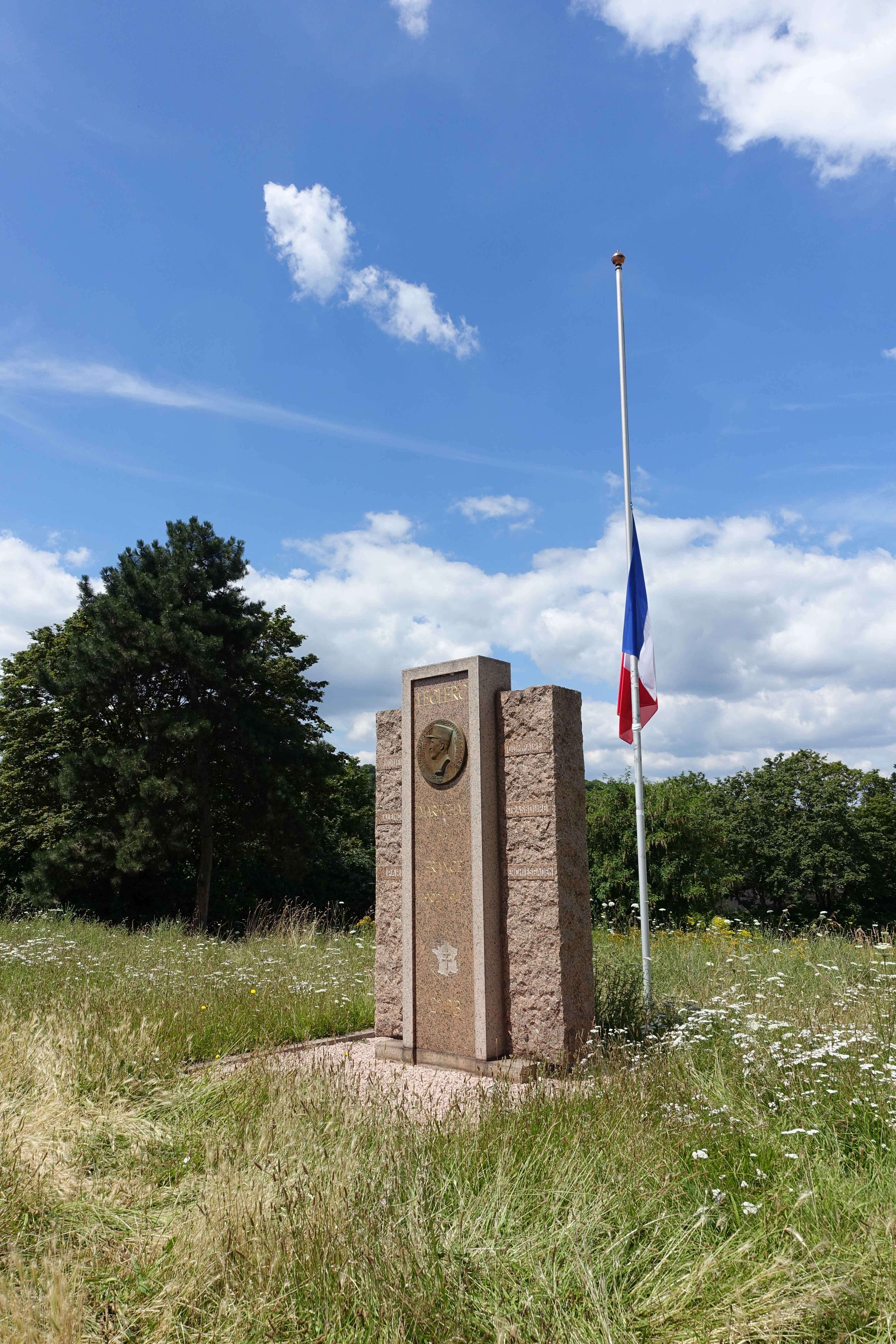 Half-mast flag @ Boulogne-Billancourt (Lieu commémoratif de la 2e DB, Avenue du Général Leclerc, 92100 Boulogne-Billancourt, France)